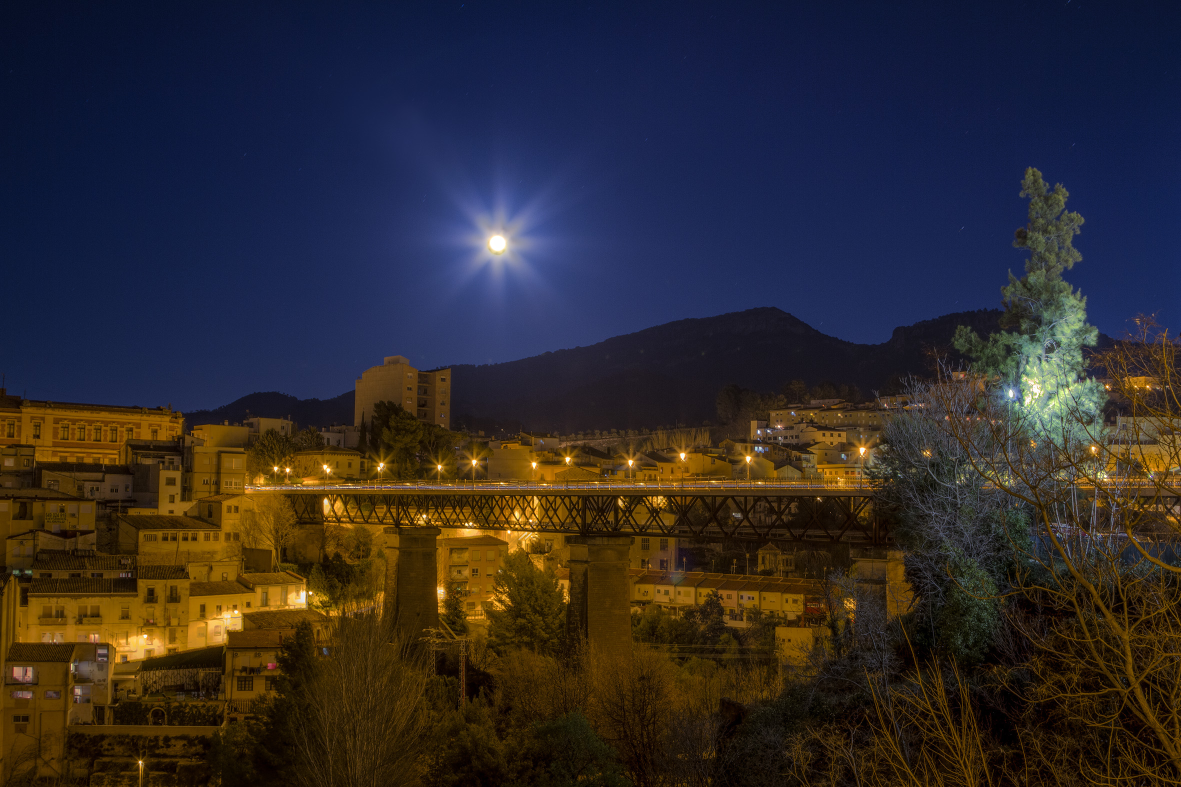 Alcoi. Puente Viaducto de Canalejas, sobre el rio Molinar año 1907 situado en el casco historico de Alcoi